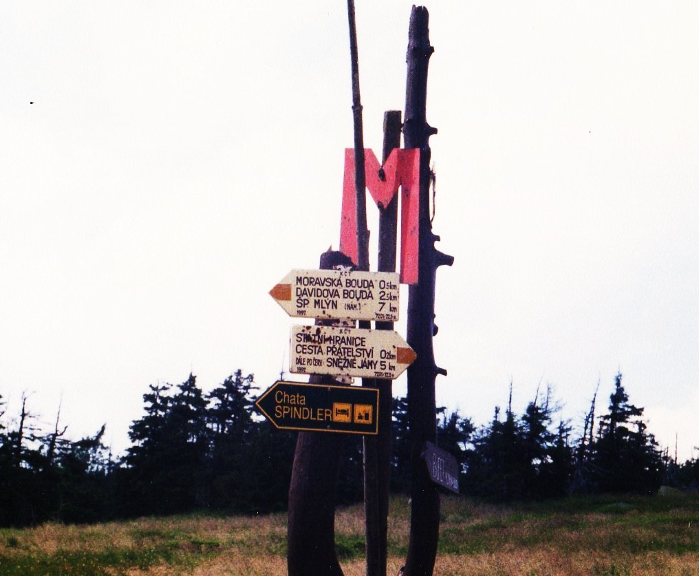 Okolice Petrovej Boudy w 1997r.